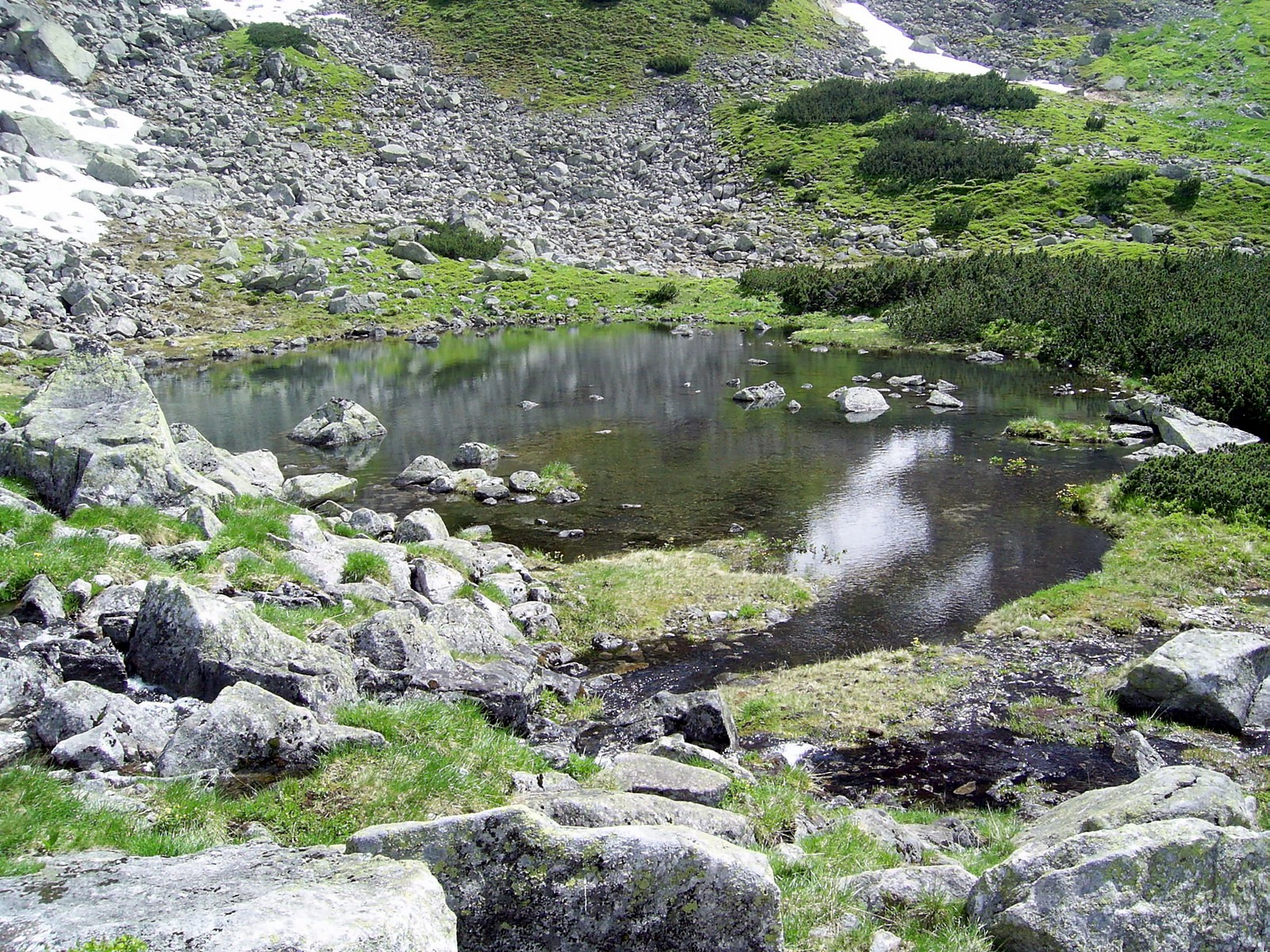 Czerwony Stawek Wschodni ze szlaku łącznikowego do przełęczy Karb